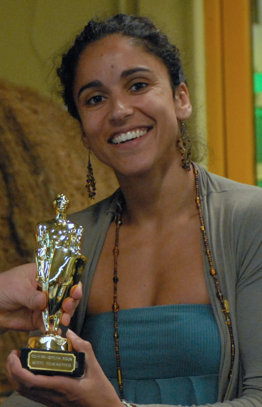 Indra Angad-Gaur neemt de Scherm-Oscar in ontvangst voor beste Nederlandse schermster 2008 -- Indra Angad-Gaur (Den Haag, 4 maart 1974) is een Nederlandse floretschermster.